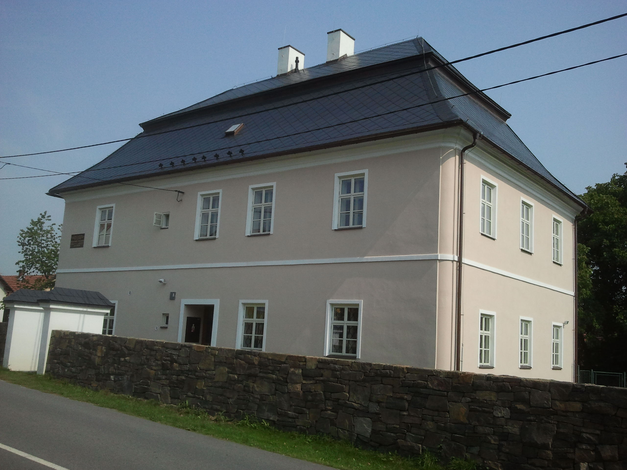 Fara (Velká Polom), Osvoboditelů 66, Velká Polom